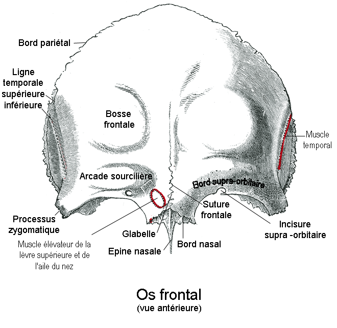 Muscle frontal.Vue antérieure. Anatomie humaine